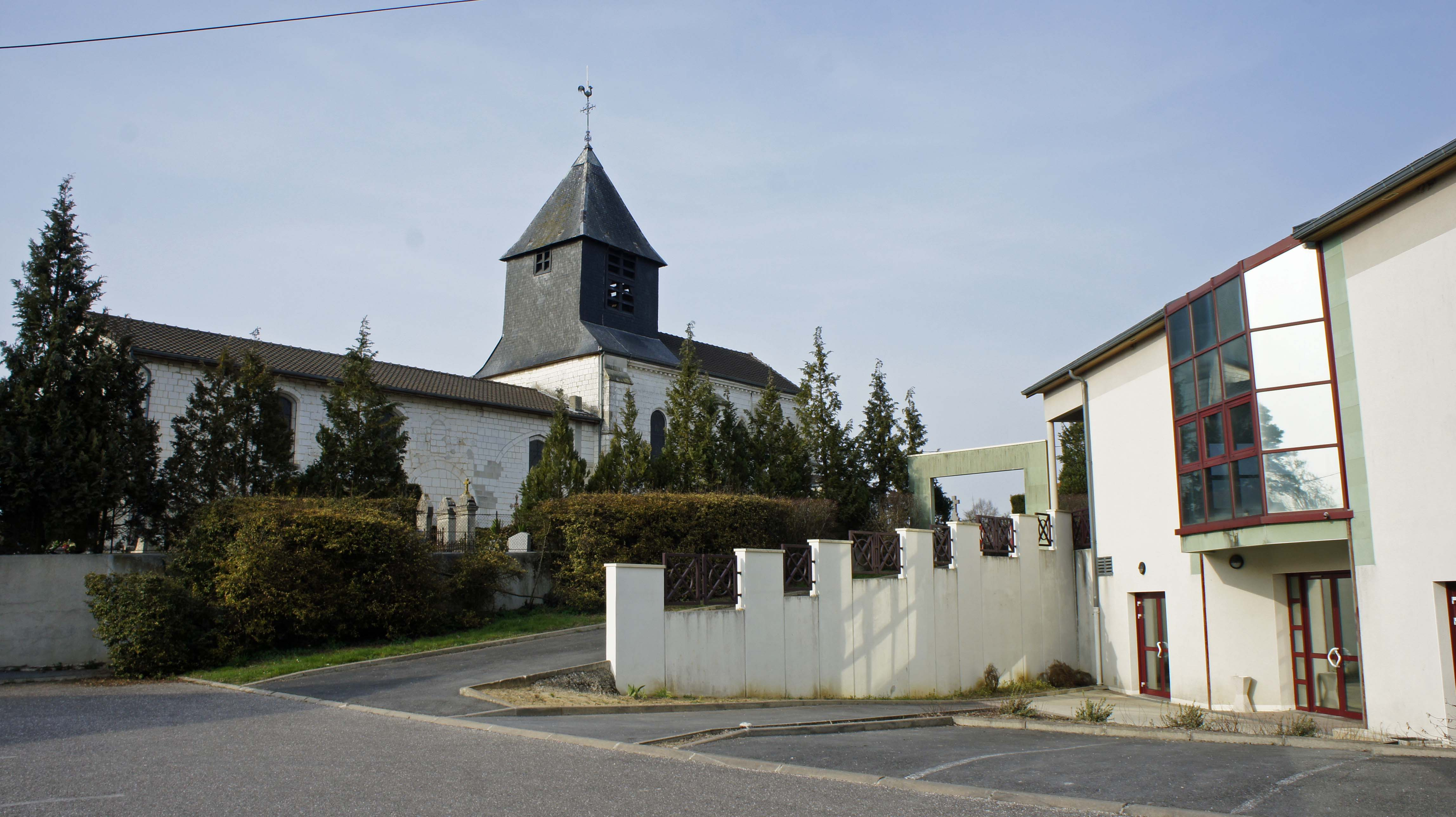 Église_et salle_municipale_de Moncetz.